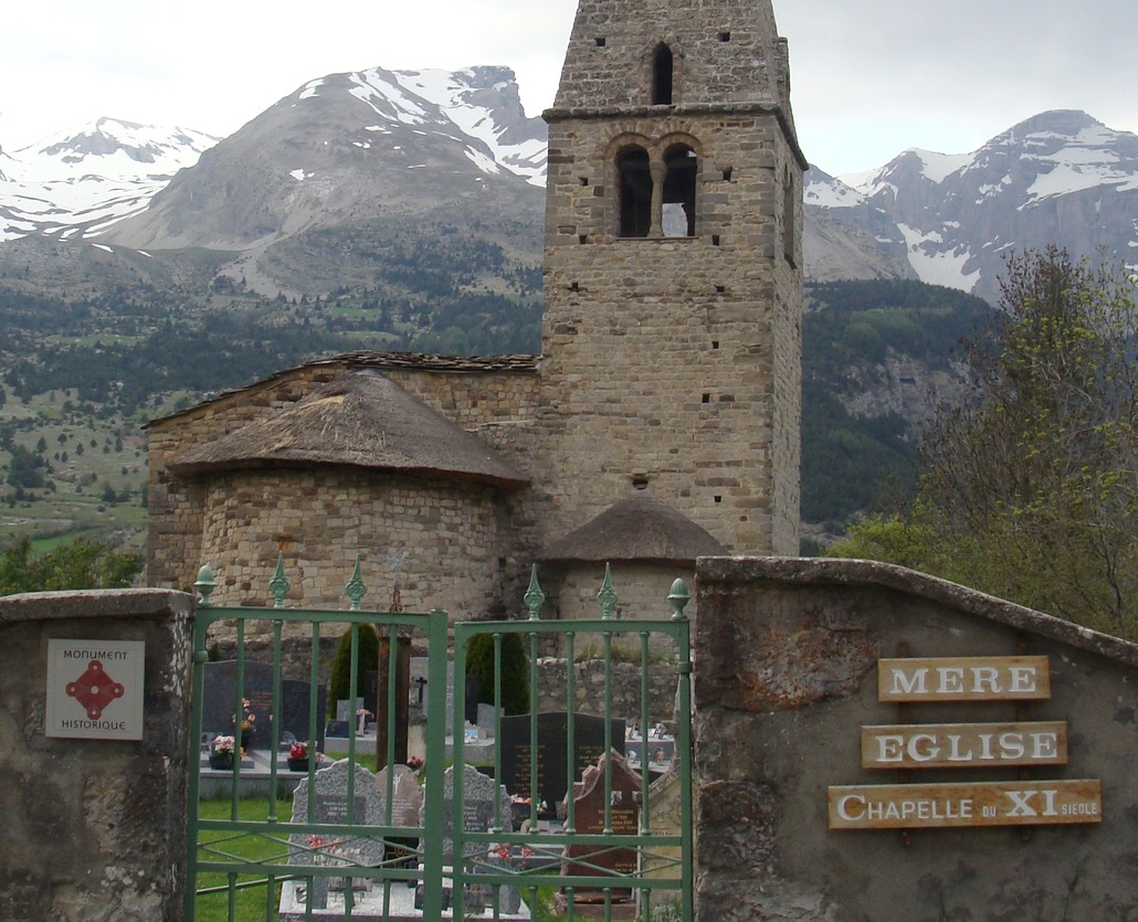 La Mère Église de Saint-Disdier en Dévoluy et son cimetière. A l'arrière plan, le massif de l'Obiou.